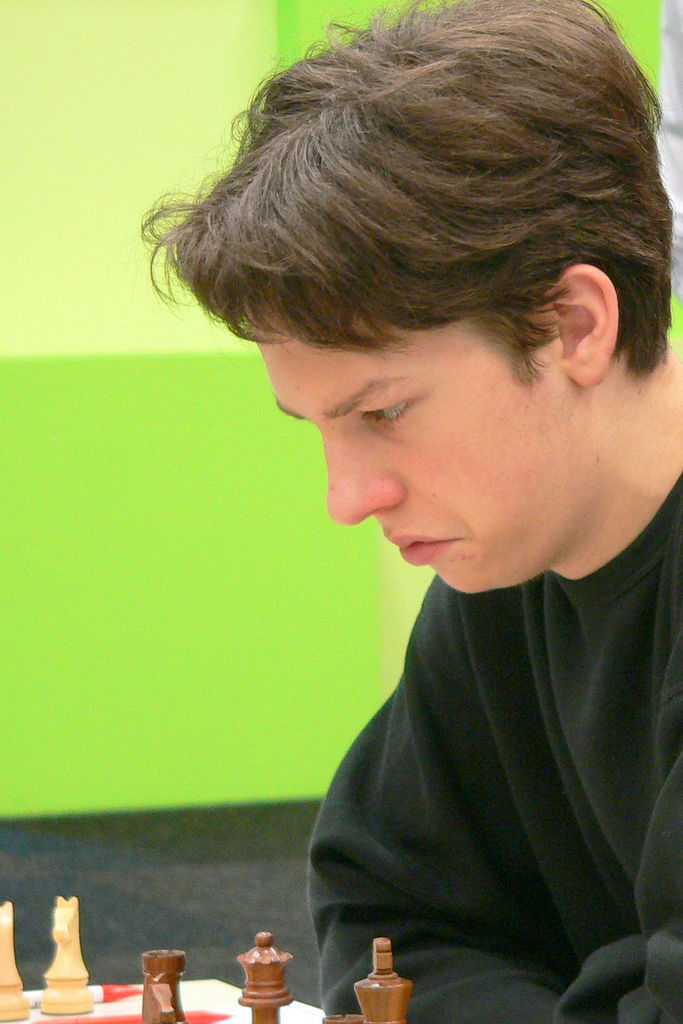 GM Daniel Stellwagen (Netherlands), Wijk aan Zee 2005